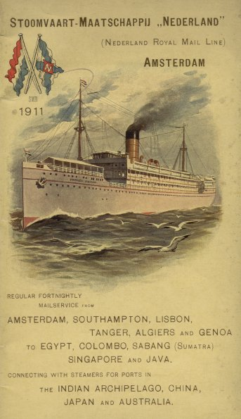 Stoomvaart Maatschappij Nederland, voorzijde boekje uit 1911